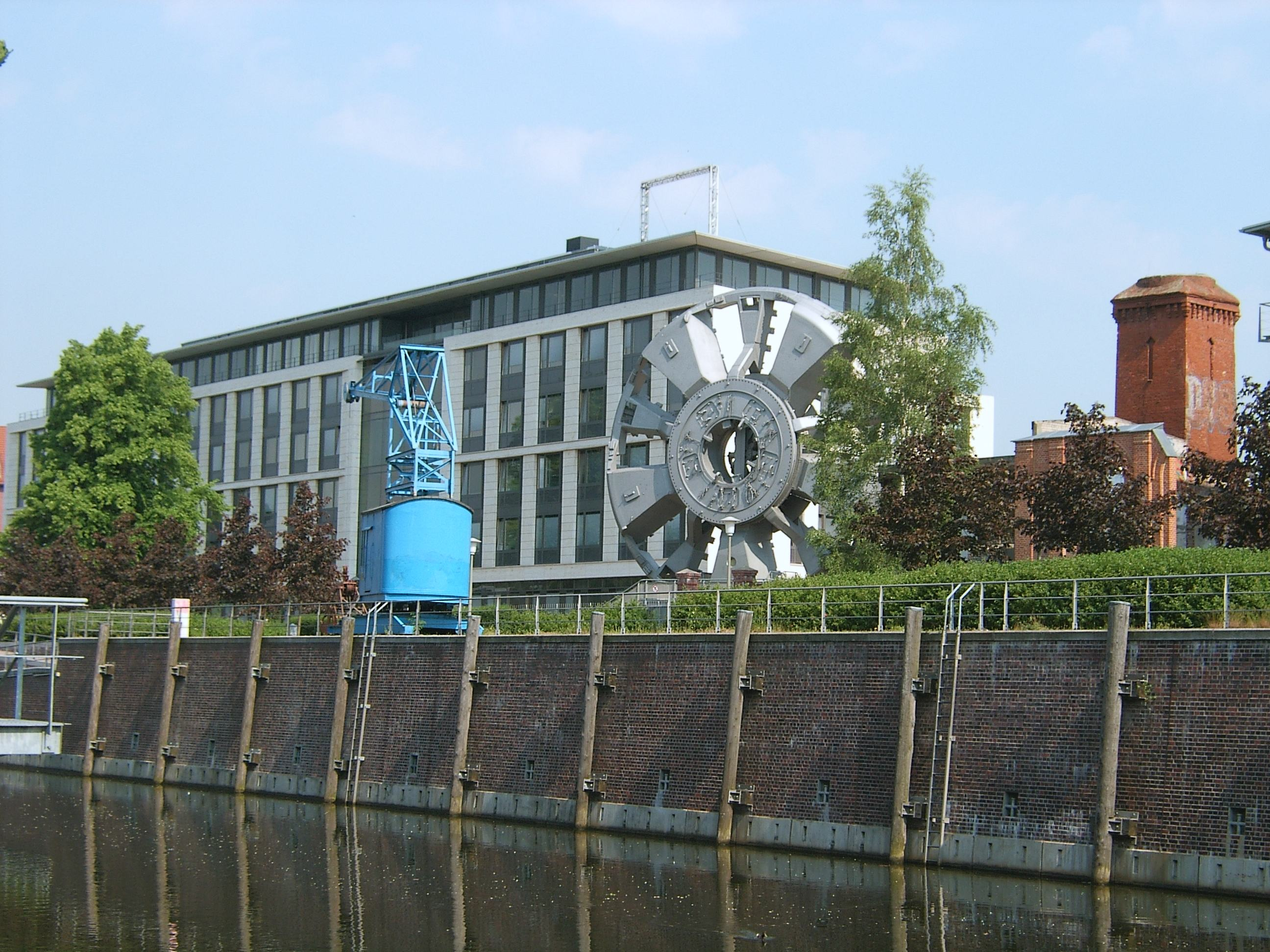 Die Zentrale der SAGA GWG in Barmbek-Nord. Im Vordergrund sind Exponate des Museums der Arbeit, wie ein Kran und das TRUDE-Schneidrad zu sehen.